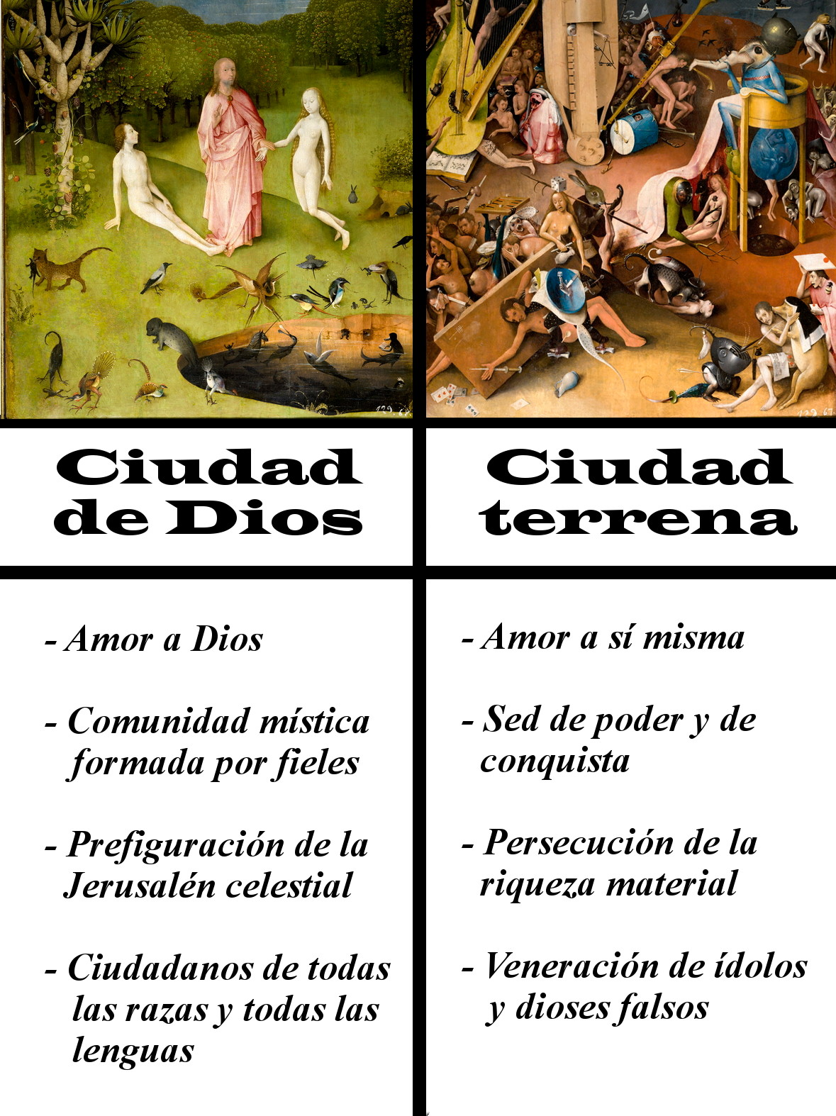 Distinción de la Ciudad de Dios y la Ciudad terrena de San Agustín